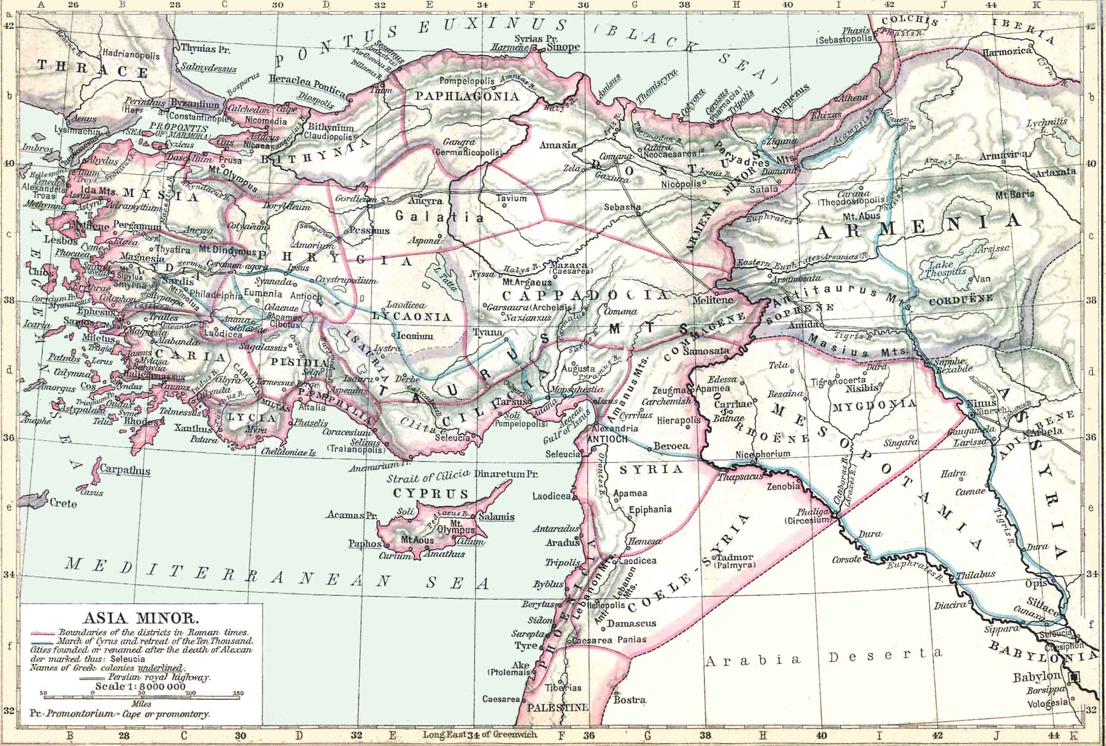 Karte Kleinasiens in der Antike, von William Robert Shepherd, 1923